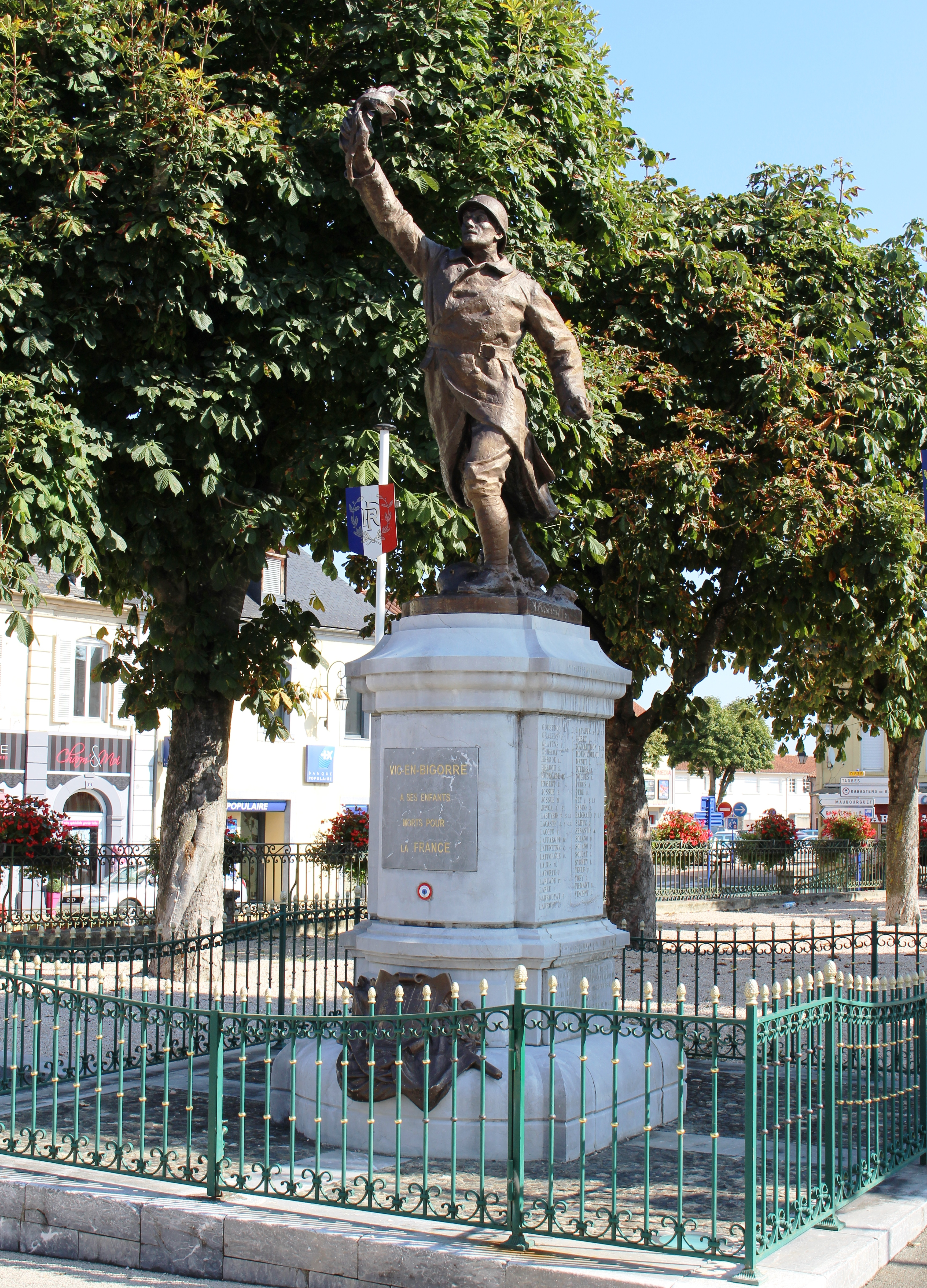 Monument aux morts de Vic-en-Bigorre (Hautes-Pyrénées) par Martial Caumont